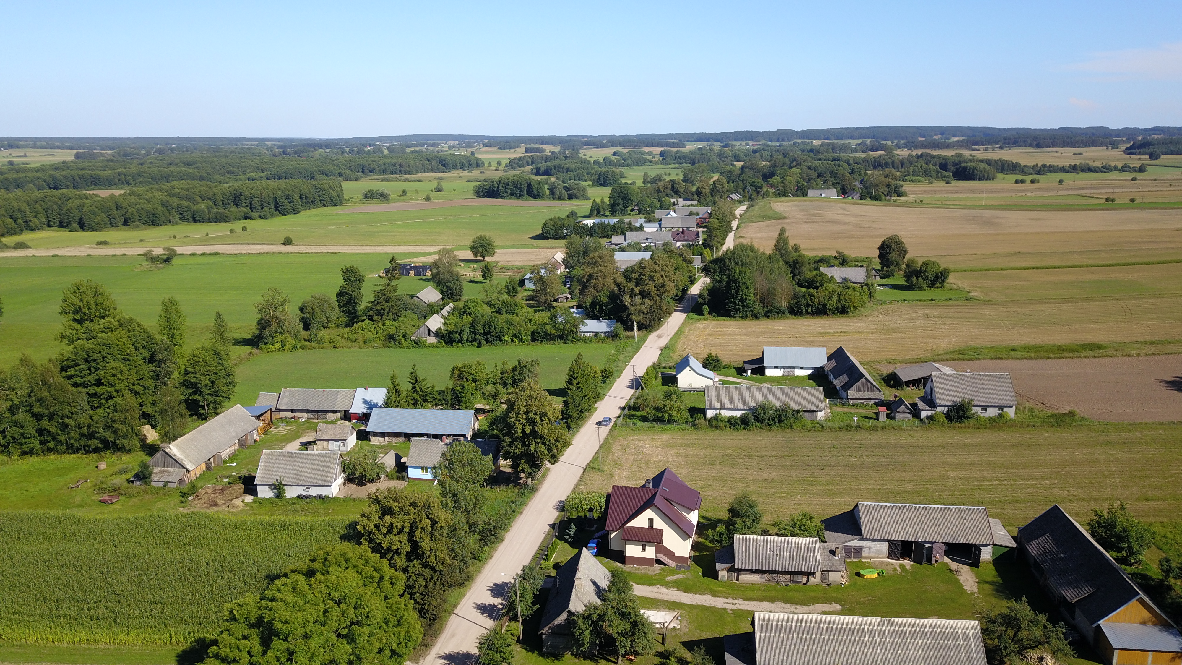 Wieś Poniatowicze, powiat sokólski